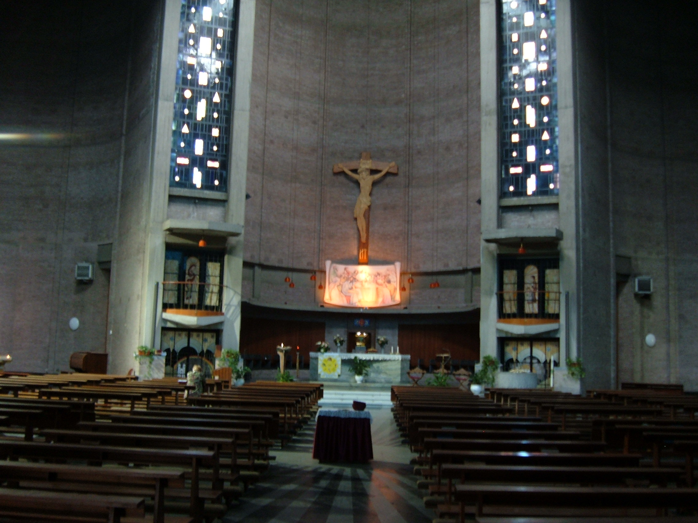 Chiesa di Nostra Signora de La Salette, a Roma, nel quartiere Gianicolense. Interno.